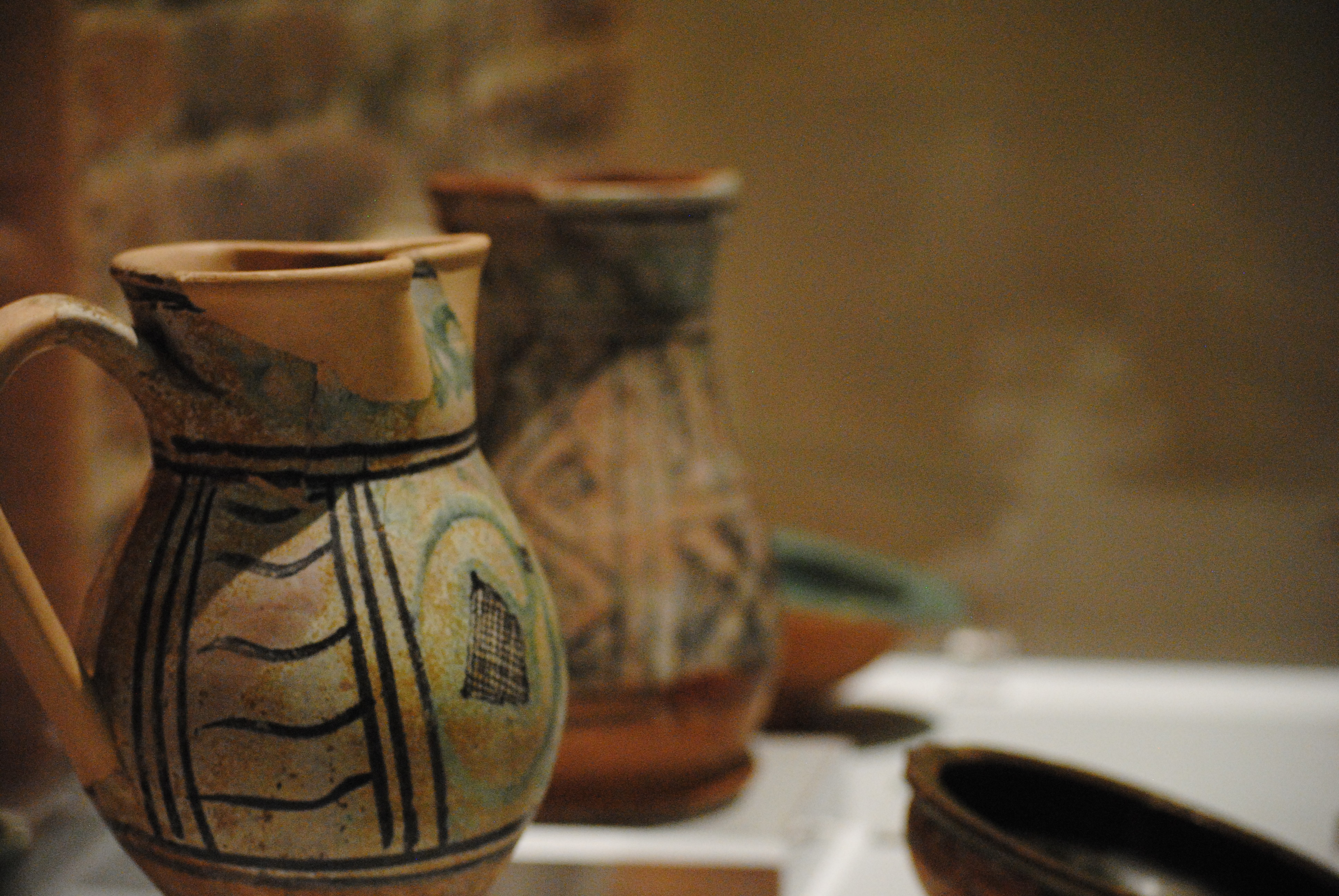 Boccale in maiolica arcaica di produzione pisana, risalente al XIII secolo (recuperato duranete i lavori di ristrutturazione presso la Torre della Fame, Pisa). Museo nazionale di San Matteo (dettaglio decorazione vicino l'ansa)